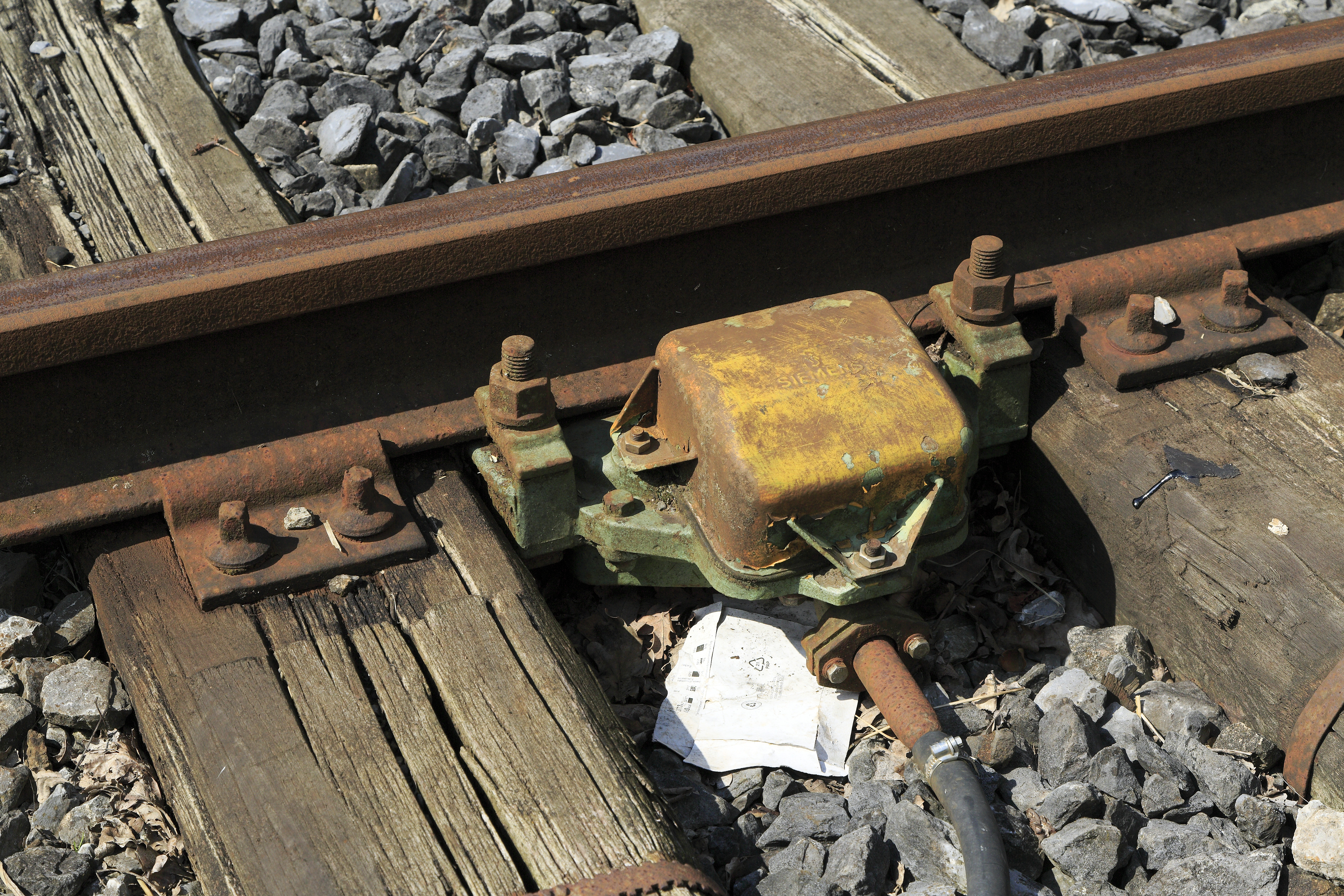 Ausschalter der Wegübergangssicherungsanlage. Der Kontakt ist das einzige Auschaltkriterium, das ist zumindest mutig.